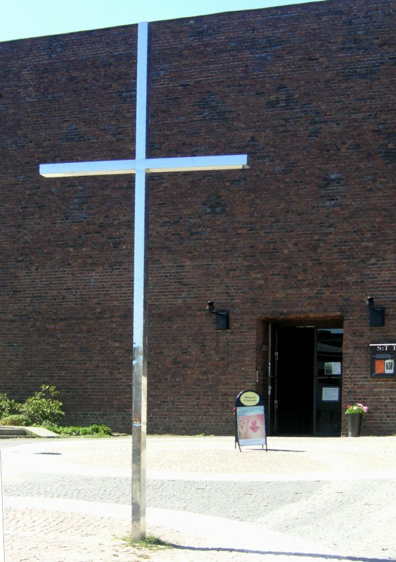 Vällingby Cenrum, S:t Tomas kyrka